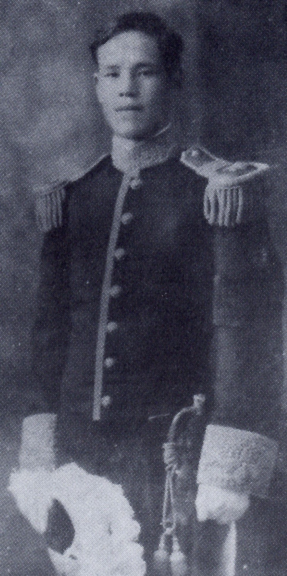 久松勝慈の肖像。